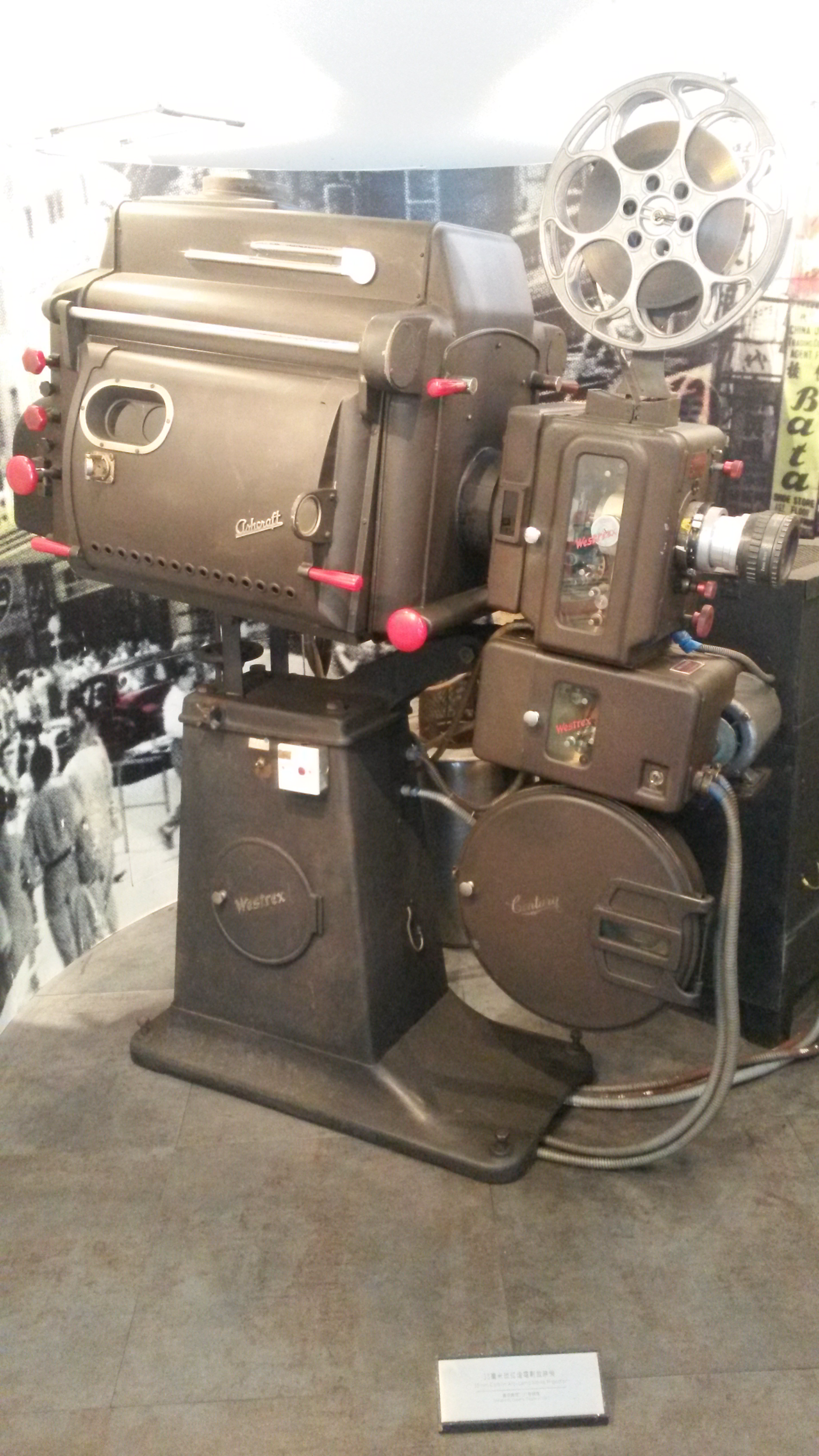 碳弧燈電影放映機